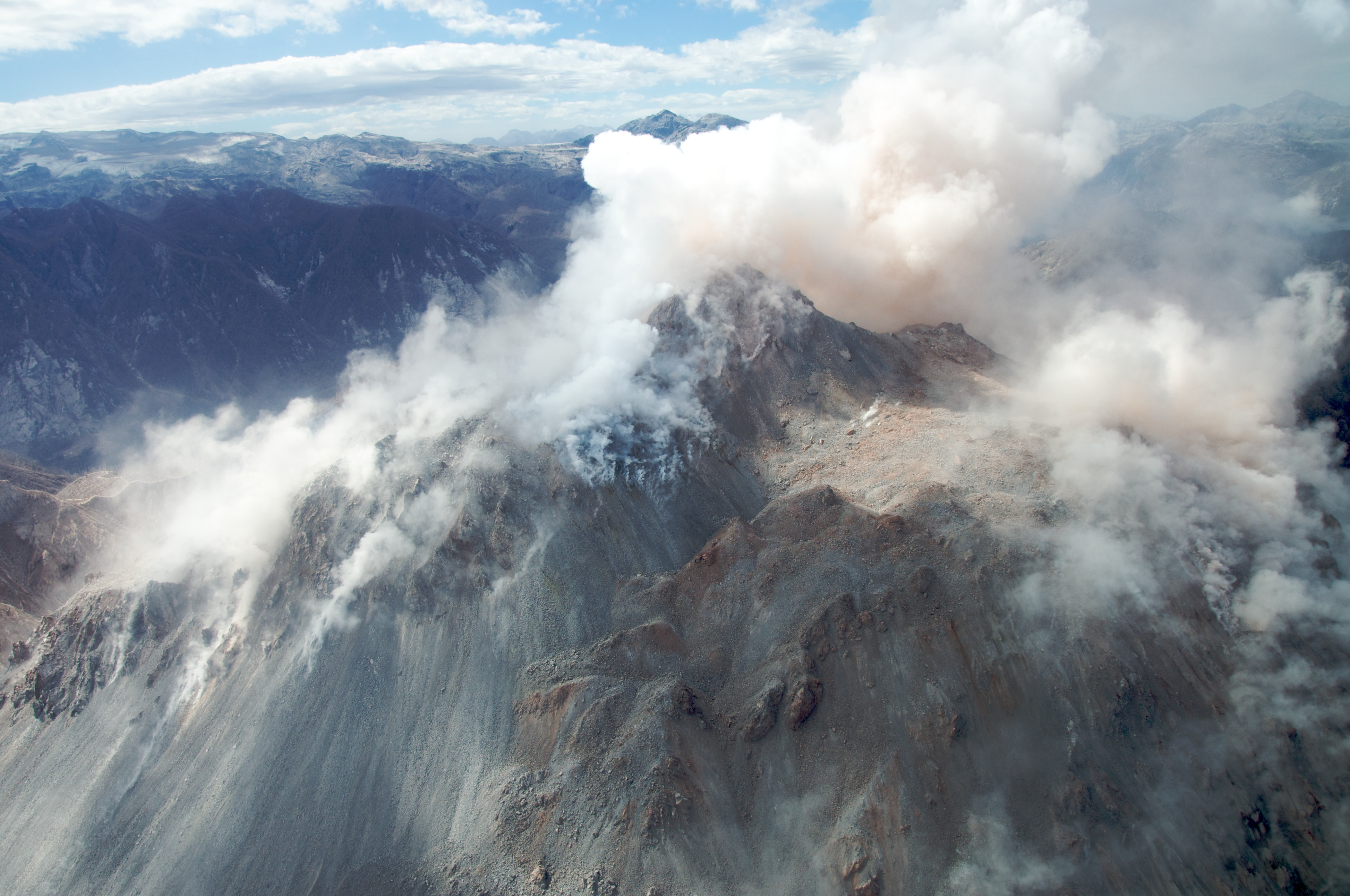 Volcán Chaitén 2